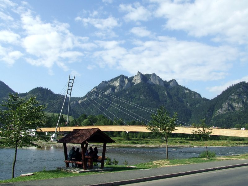 Turystyczne przejście graniczne Červený Kláštor - Sromowce Niżne, w tle Trzy Korony